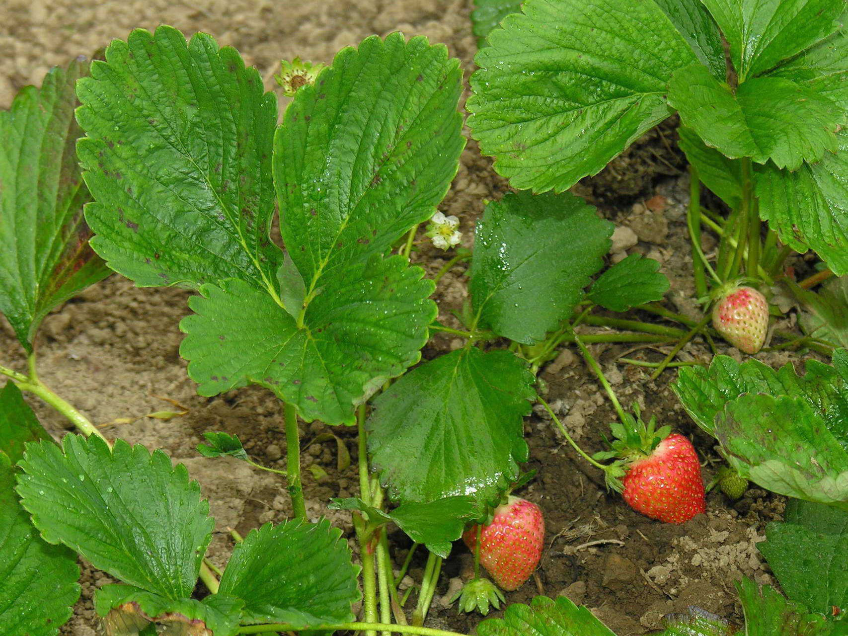 Morangos en Mandaio, Oza dos Ríos (Galicia)